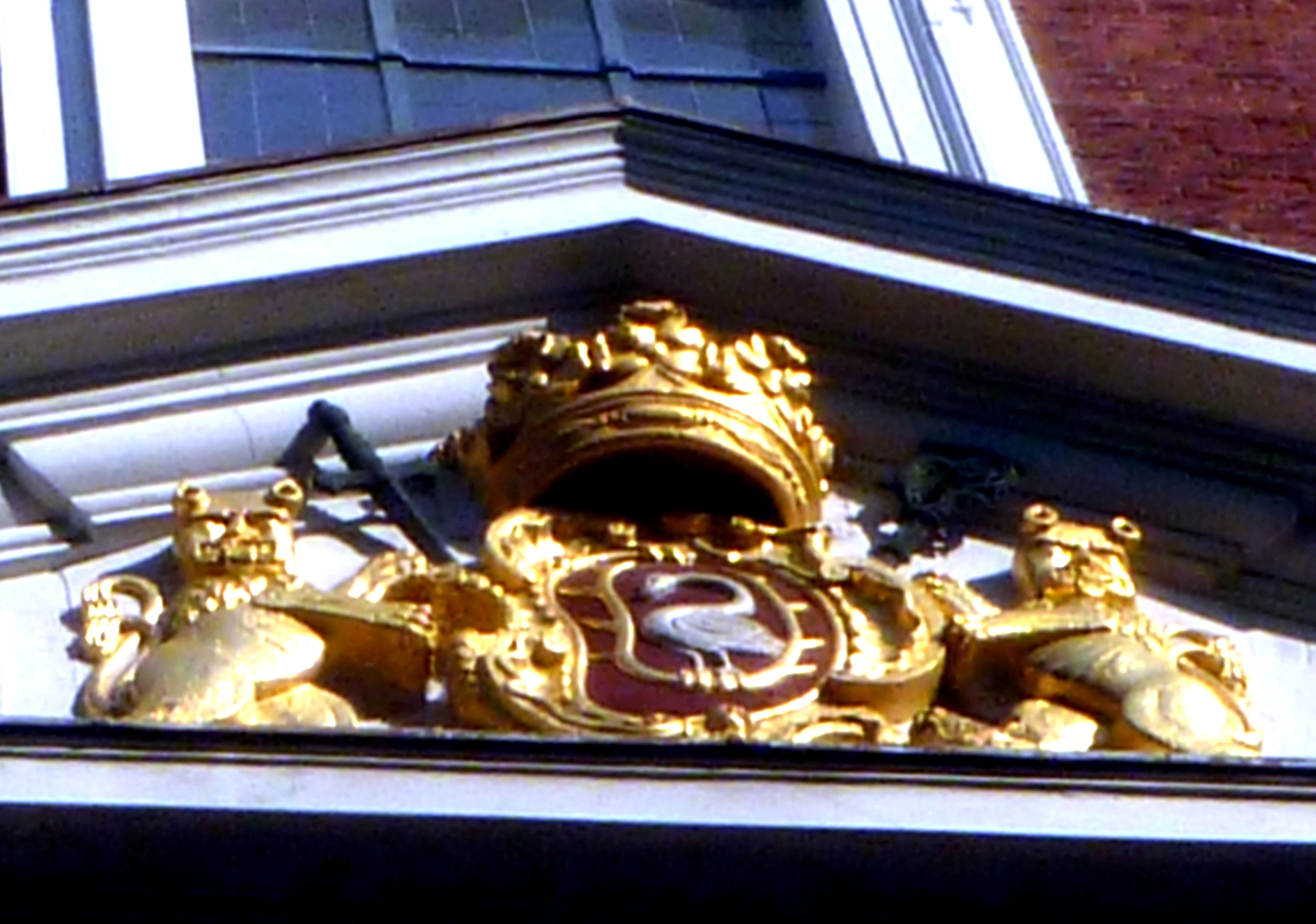 Wappen der Äbtissin Maria Antoinette von Woestenraeth der Abtei Burtscheid, angebracht an der Nordseite der Kuppel von St. Johann Aachen-Burtscheid